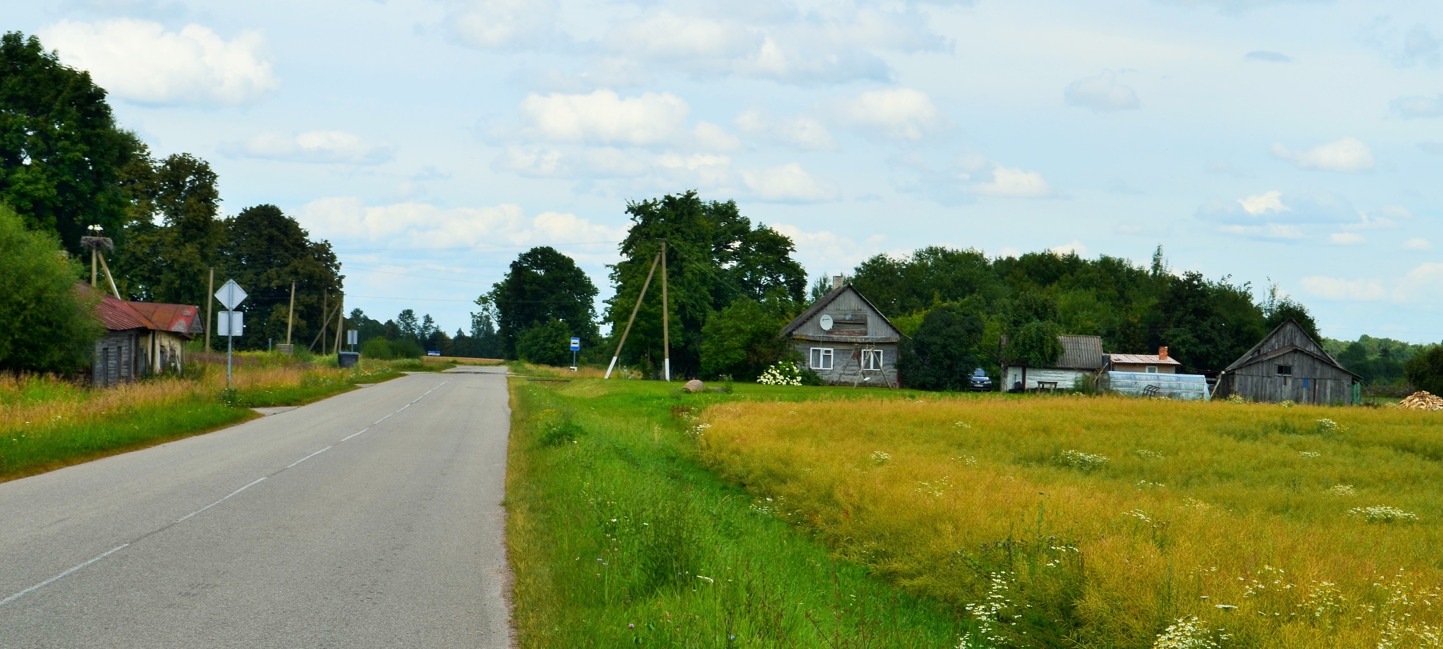 Belazariškiai, Ukmergės raj.